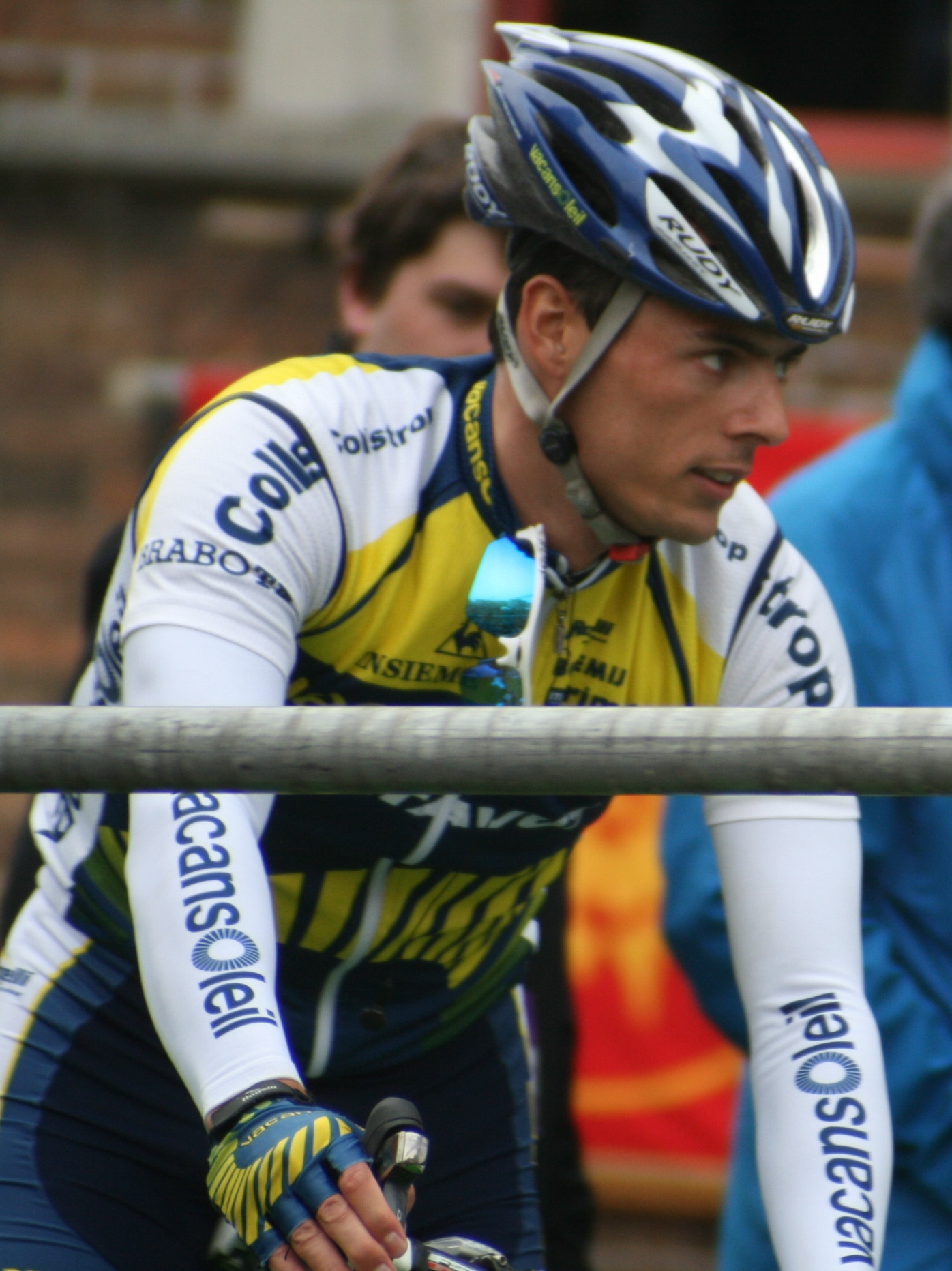 Bjorn Leukemans au départ du Tour des Flandres 2009